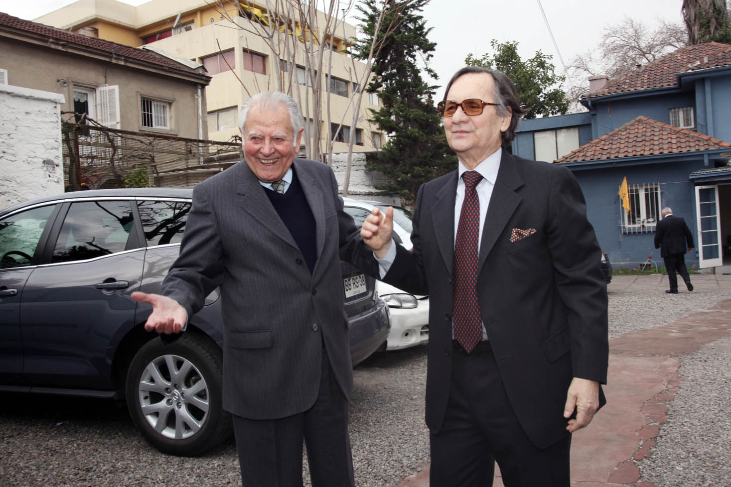 Eduardo Frei se reúne con Patricio Aylwin en el comando.